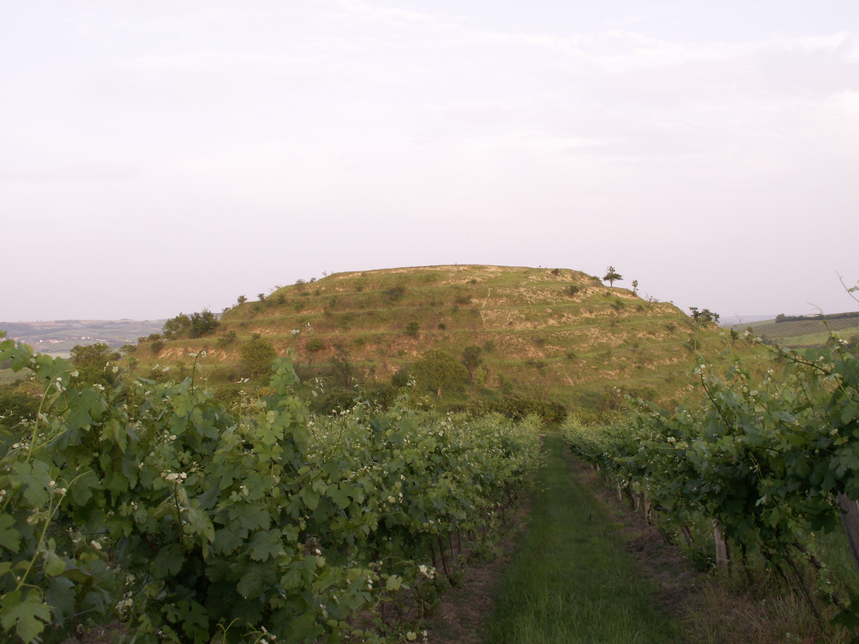 kóta Velká Slunečná (283,1 m n.m.) v Dunajovických vrších, součást národní přírodní památky Dunajovické kopce